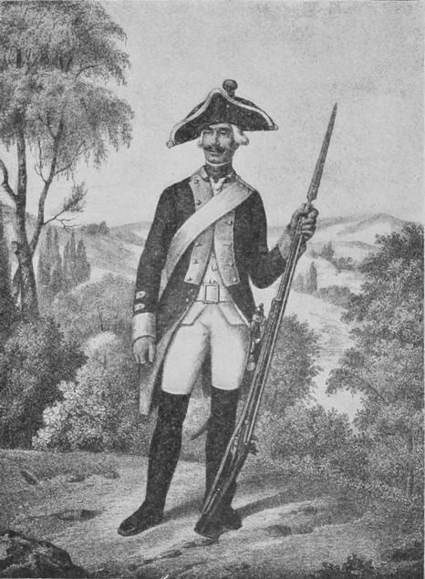 Данное изображение было использовано в статье «Белозерский, 13-й пехотный, генерал-фельдмаршала графа Ласси, полк» опубликованной в пятом томе «Военной энциклопедии», который был издан книгоиздательским товариществом Ивана Дмитриевича Сытина в 1911 году в столице Российской империи городе Санкт-Петербурге. Изначально — иллюстрация №937 в 7 томе Исторического описания одежды и вооружения российских войск.